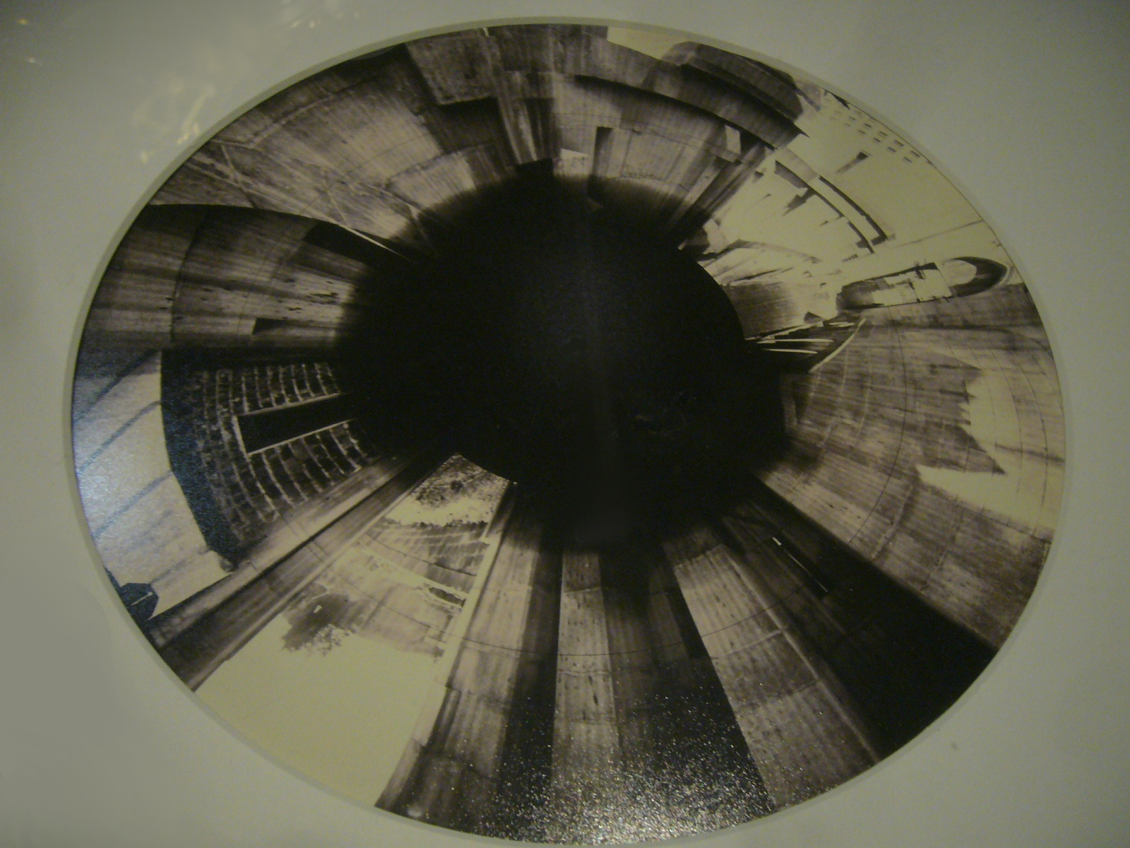 Panorama du chateau de Pierrefond en 1966, Prise par une Planchette photographique. Photo d'Auguste Chevalier mort en 1968.